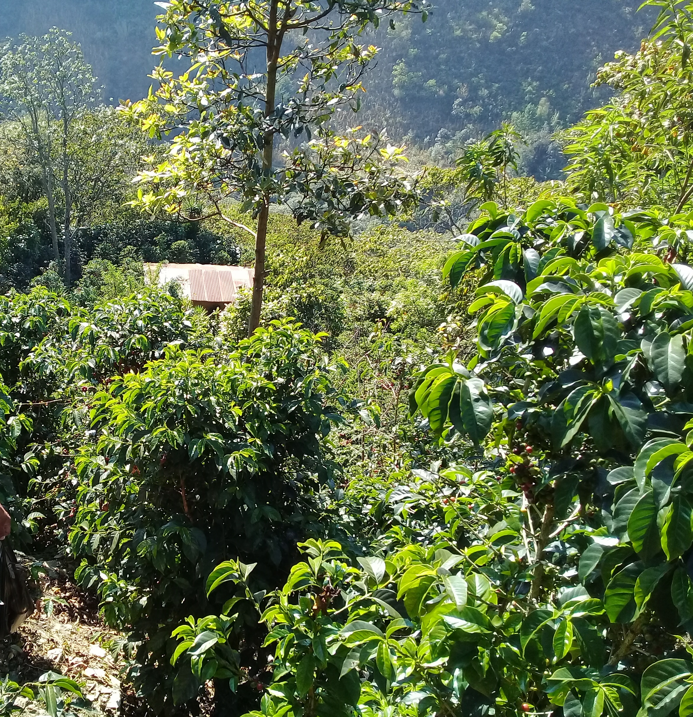 Territorio Cálido